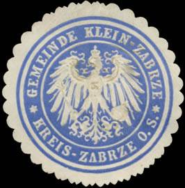 Sealing stamp Title: Gemeinde Klein-Zabrze Kreis Zabrze Description: blau, weiß, geprägt Place: Kleinzabrze/Schlesien size: 3 cm